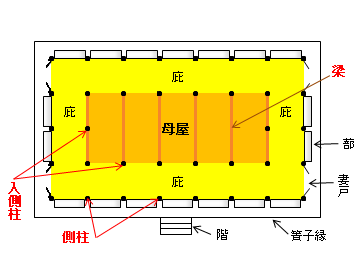 平面図・側（かわばしら）と入側柱（いりかわばしら）。近藤豊『古建築の細部意匠』等により作成。